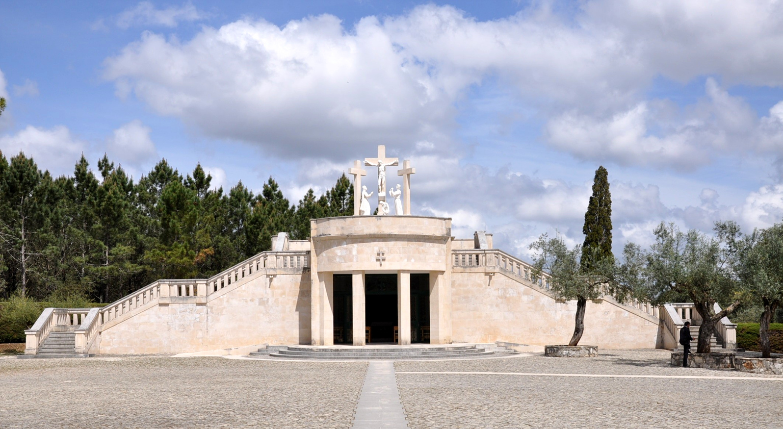 Calváro Hungaro Fatima 0618